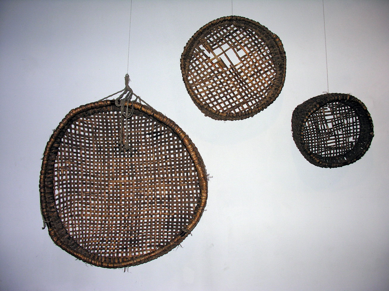 Kretilai